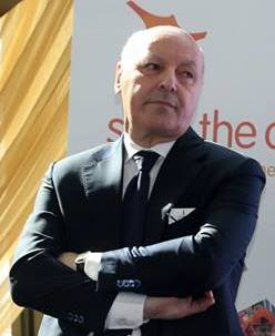 Supercoppa Italiana 2016